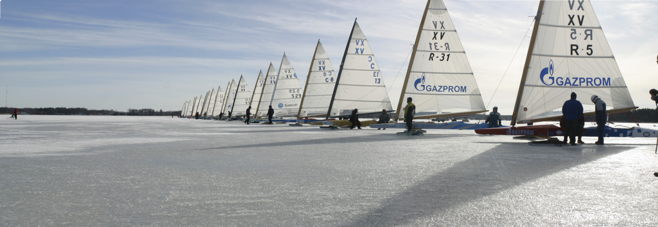 monotype startingline